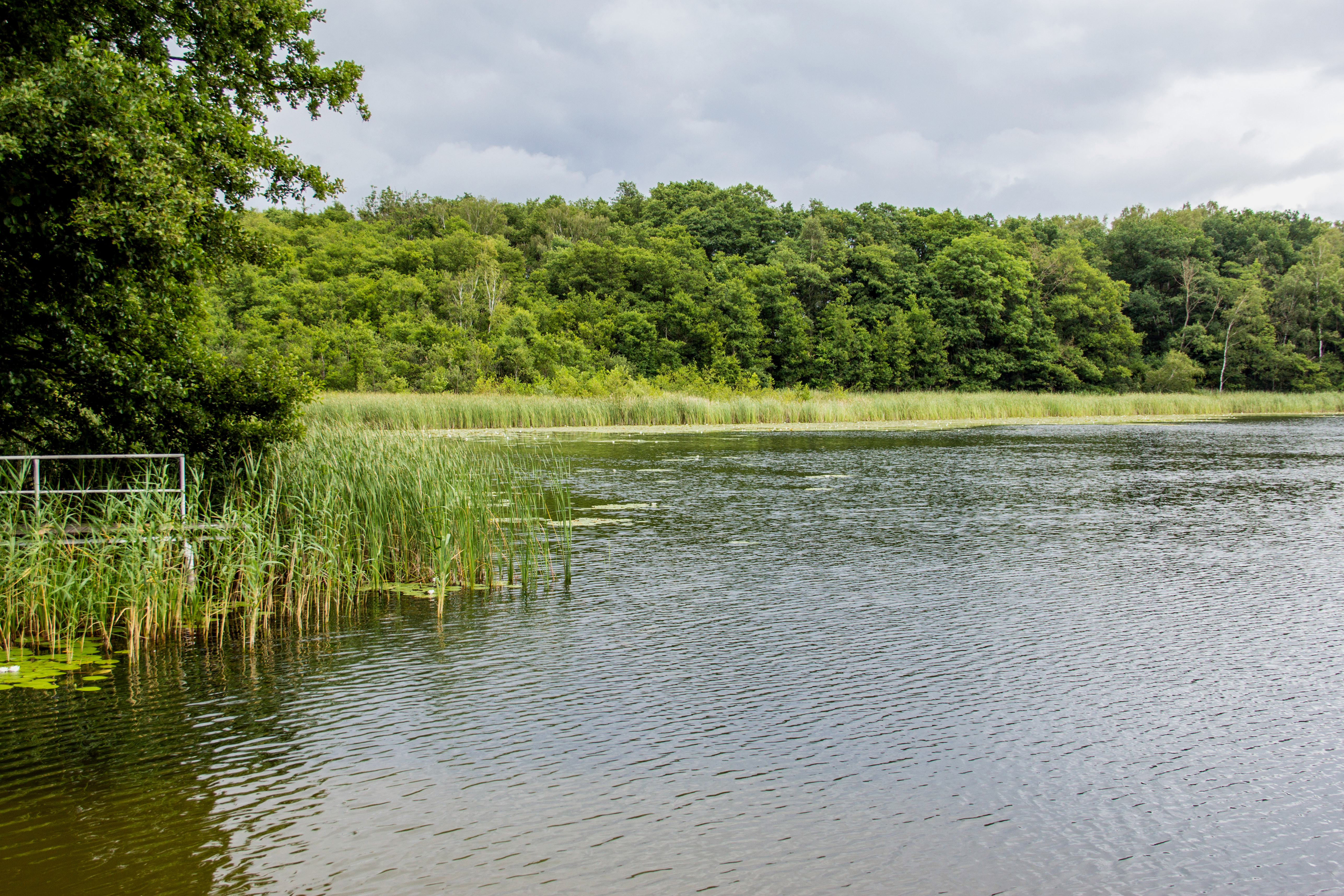 Wald am Zierker See, Landschaftsschutzgebiet Neustrelitzer Kleinseenplatte